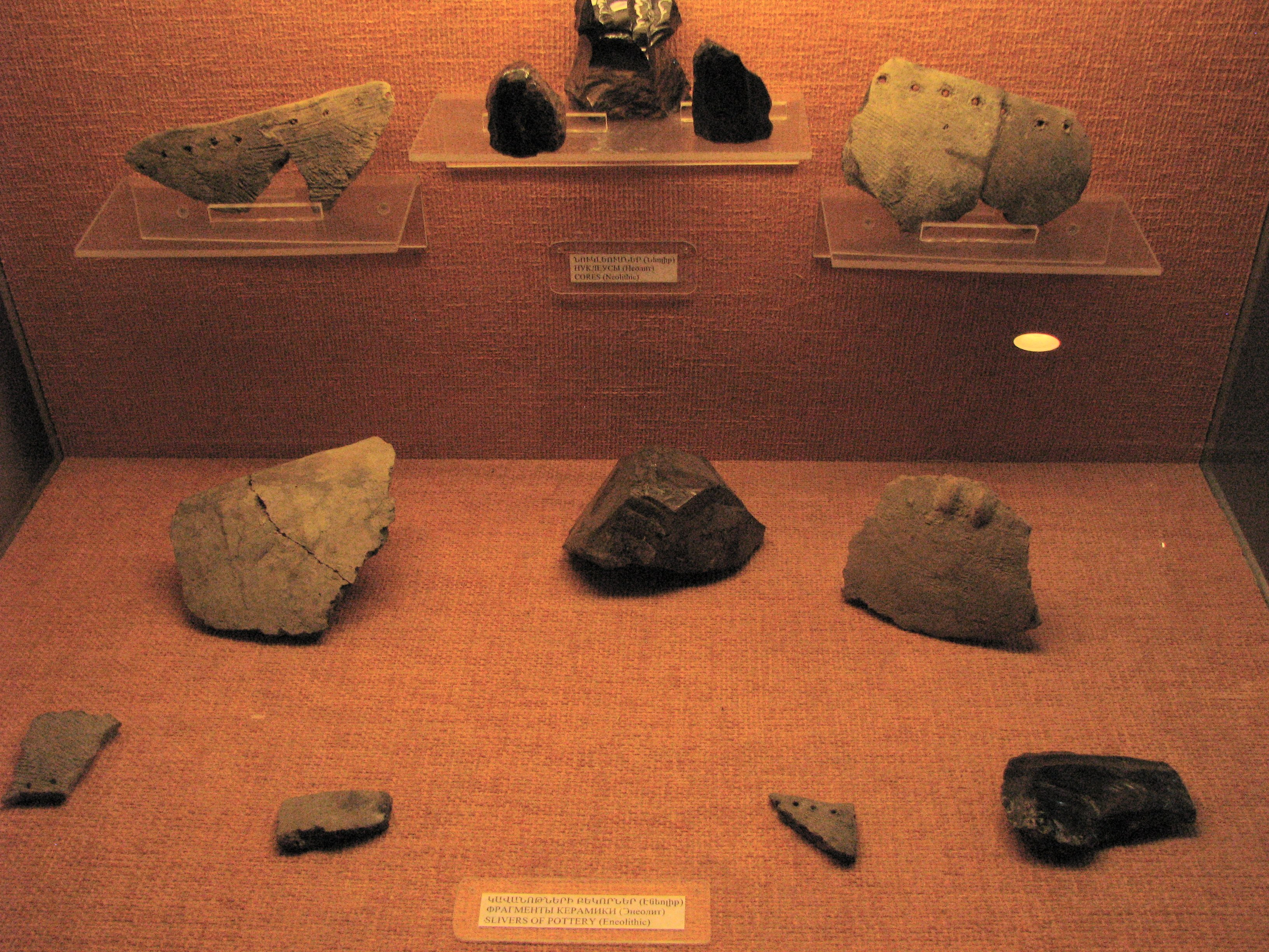 Թանգարանում պահվող պեղածոները 11/2